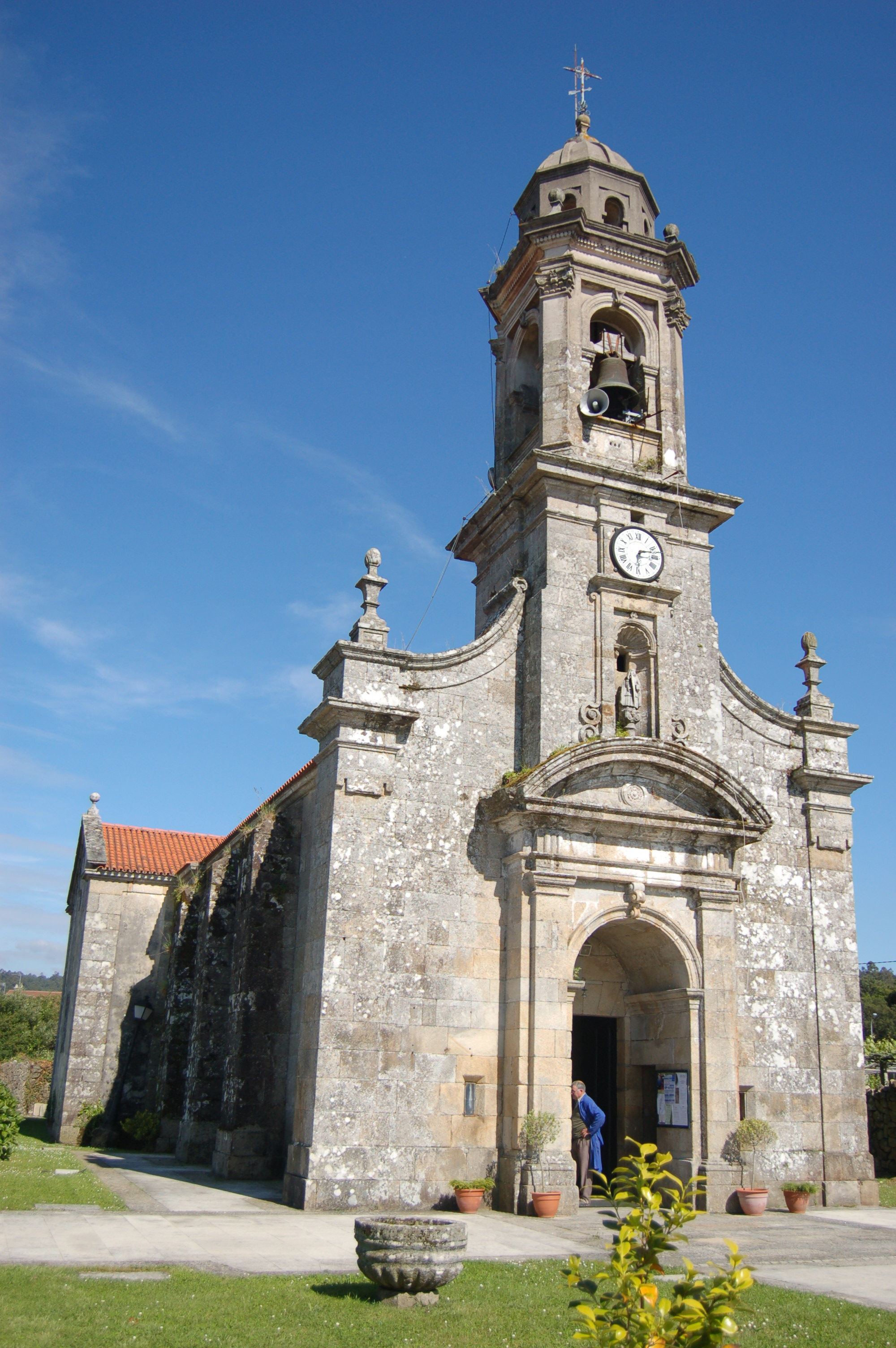 Igrexa parroquial de Santa Baia de Ribadumia (Ribadumia)